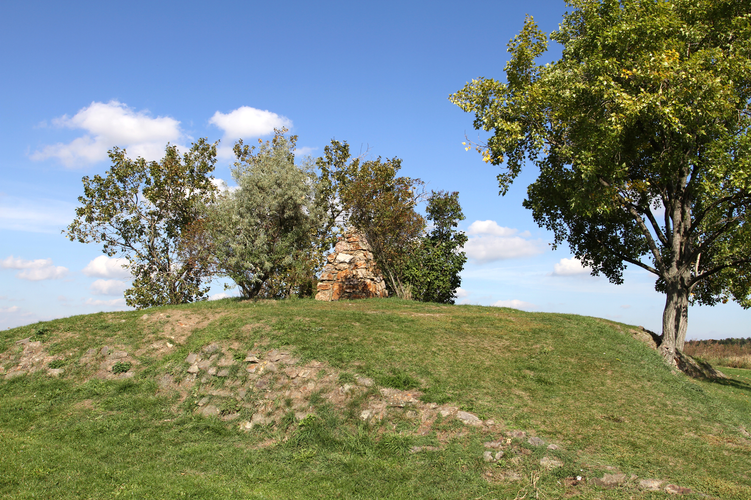 Bojiště Bílá hora, Praha 6-Liboc, Liboc (Ruzyně)